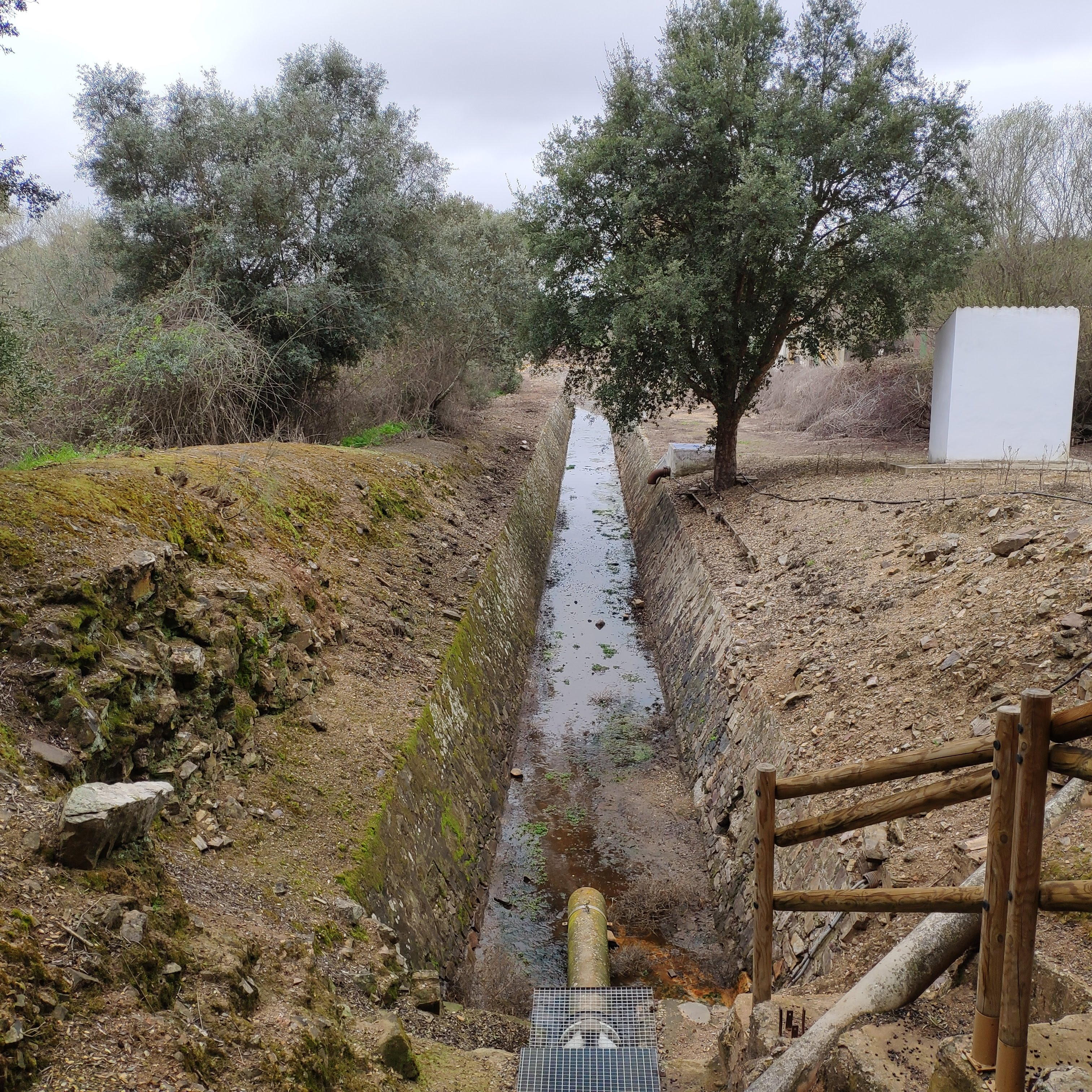 Origen del acueducto Aqva Avgvsta en la presa de Cornalvo